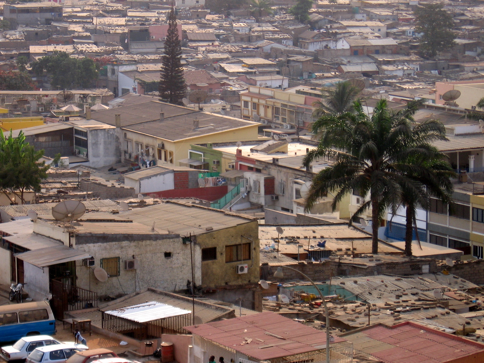 Maianga, suburb of Luanda, Angola (2007)